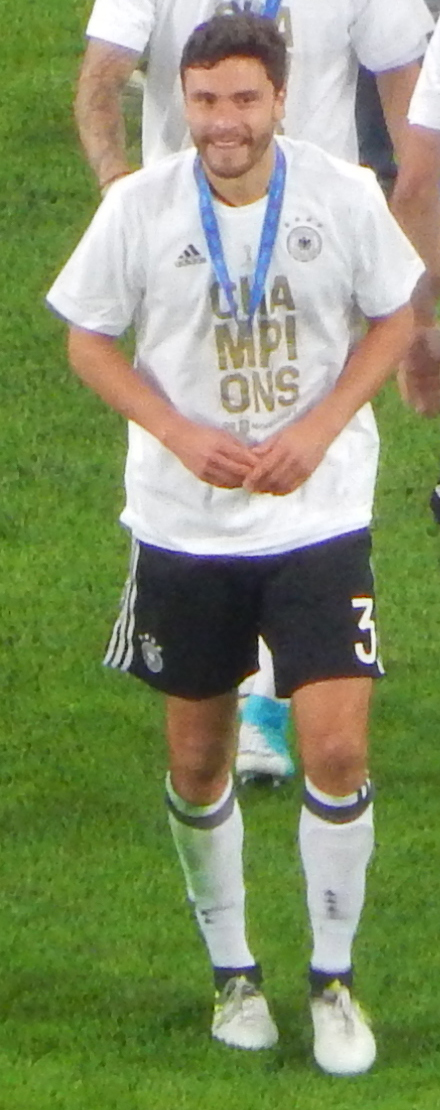 Финал Кубка конфедераций 2017